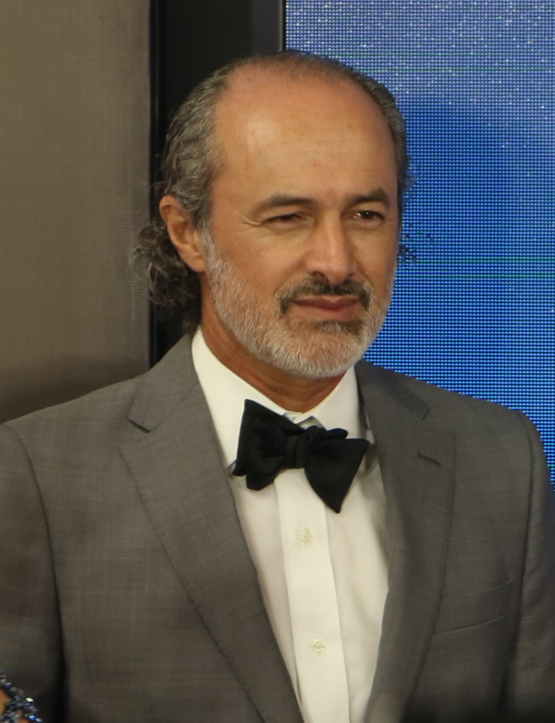 Carlos Alcántara durante la alfombra roja de Asu Mare 3.